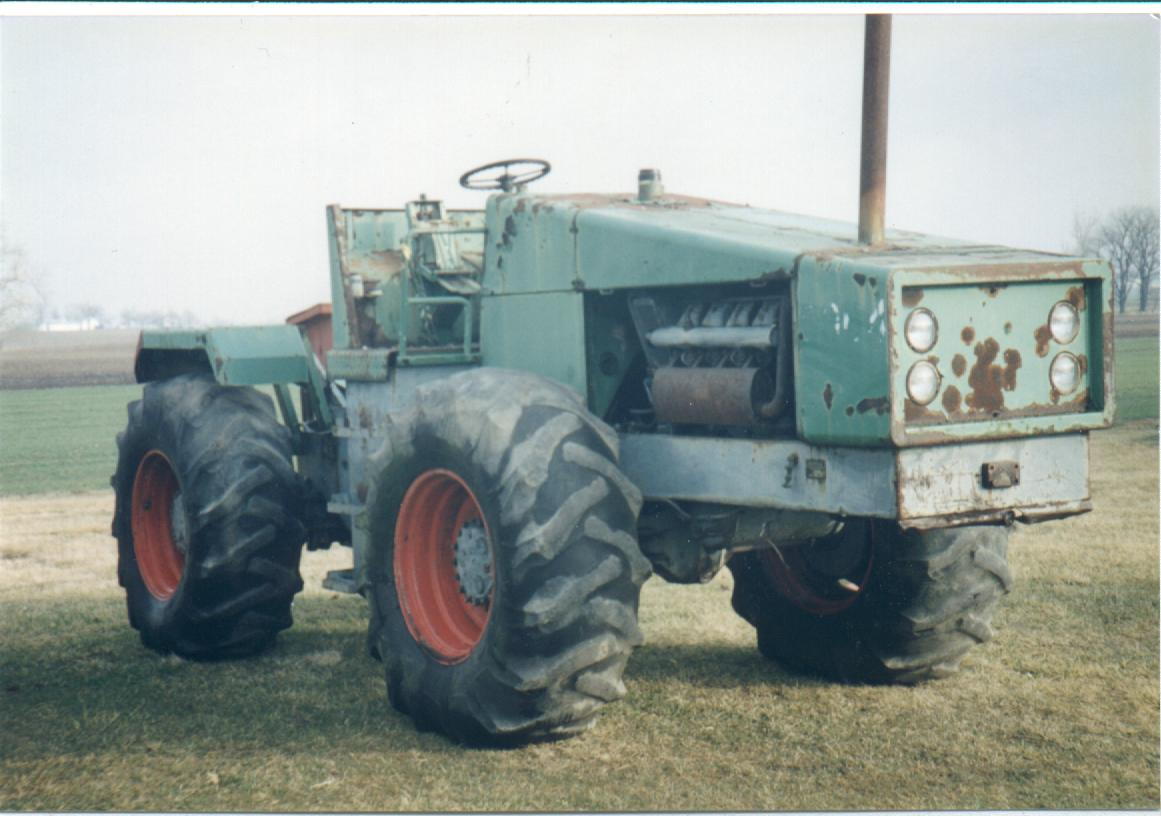 Deutz D 160 06 der zweiten Serie